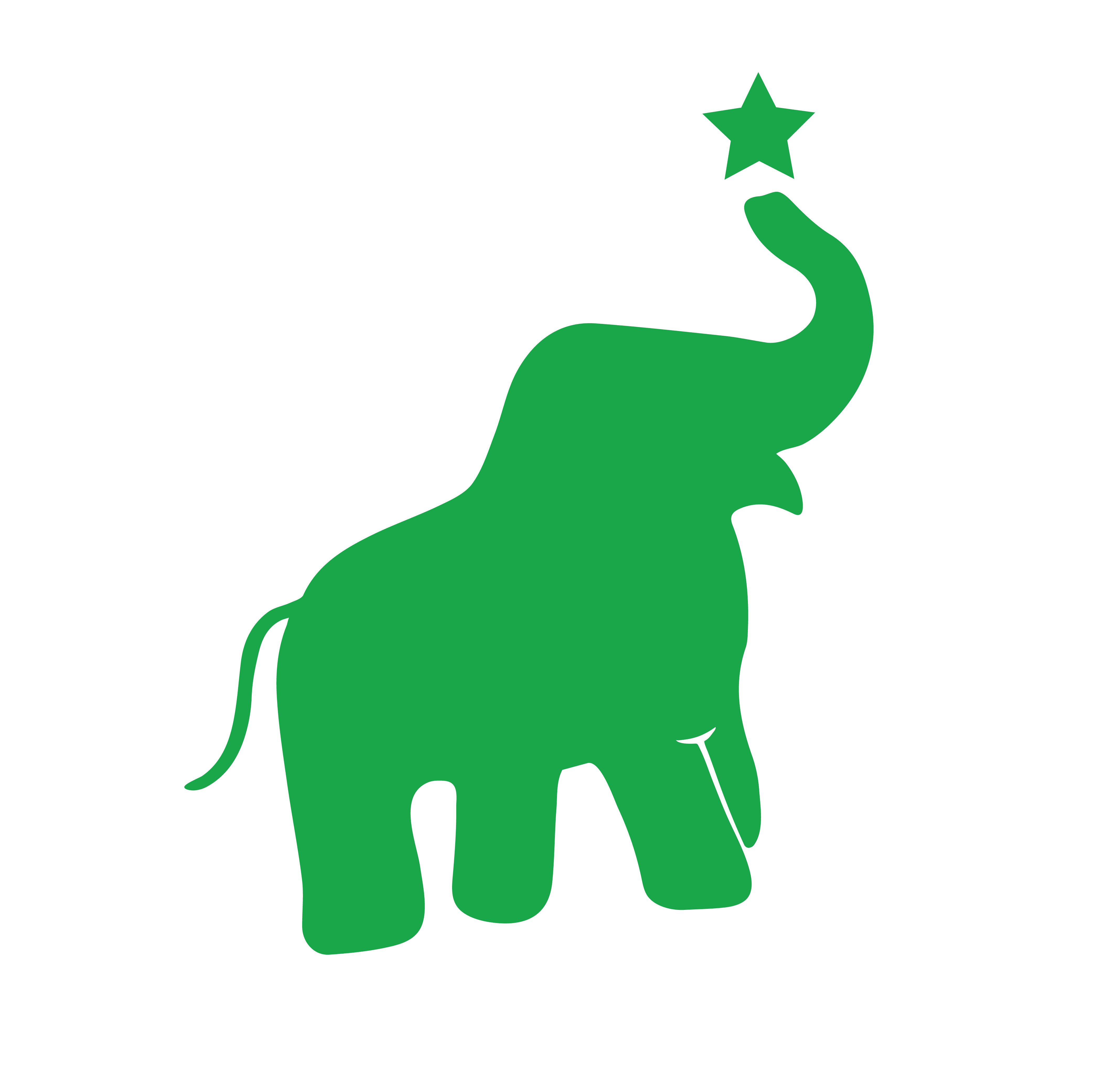 La emblemo de Bangkoka Esperanto-Klubo Verda Elefanto.